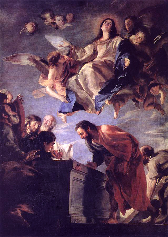 La obra representa la asunción de la Virgen María en cuerpo y alma a los Cielos.